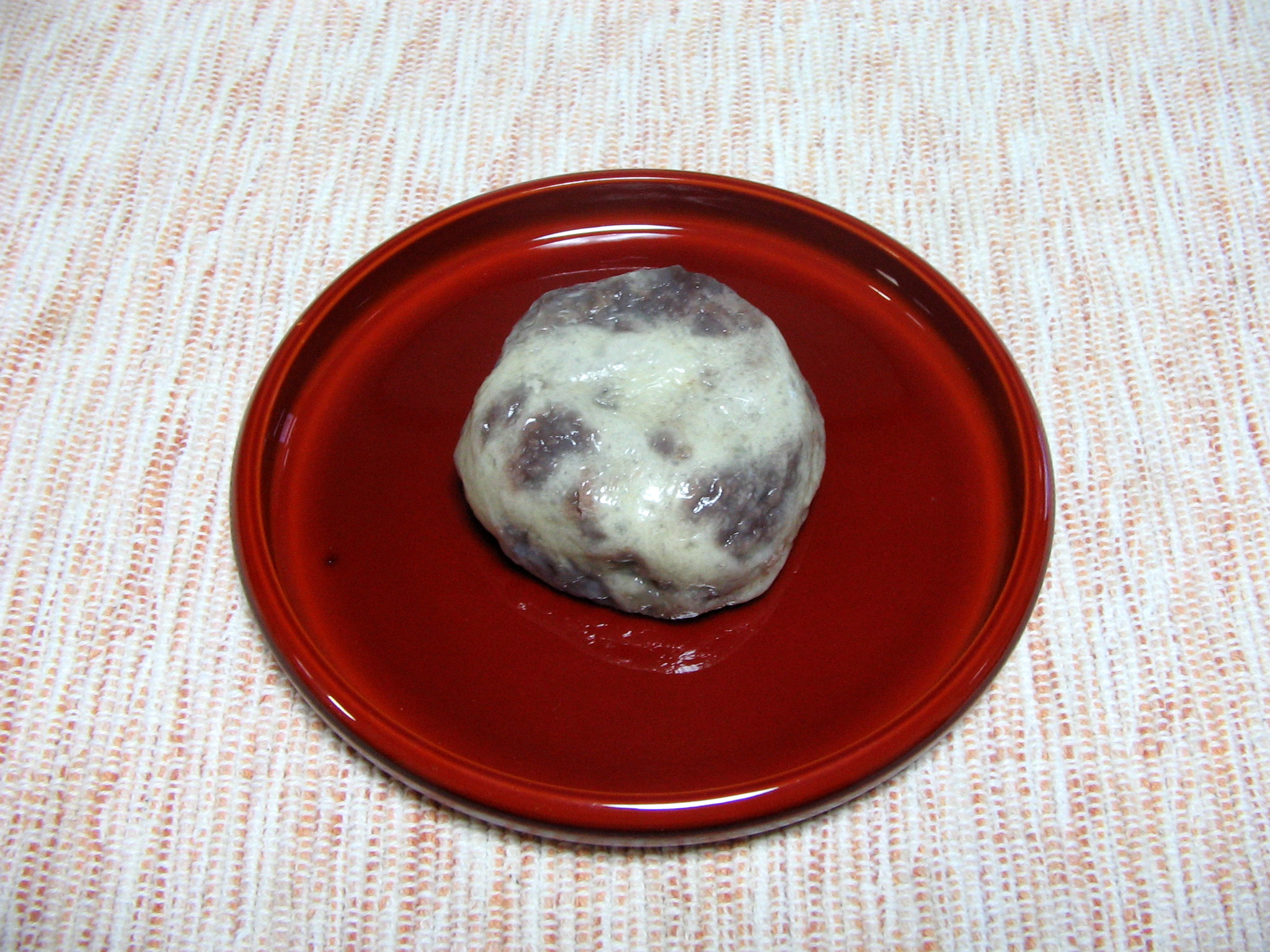 Toraya Manjū (A traditional steamed bean-jam bun at Toraya Rōho in Kuwana, Mie, Japan)